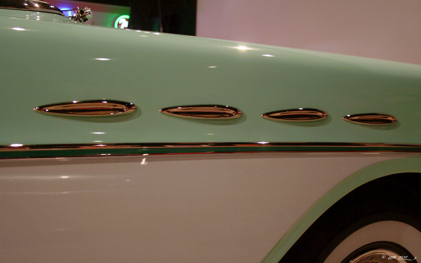 '57 Heaven Museum & Branson/Springfield, MO, March 20, 2008